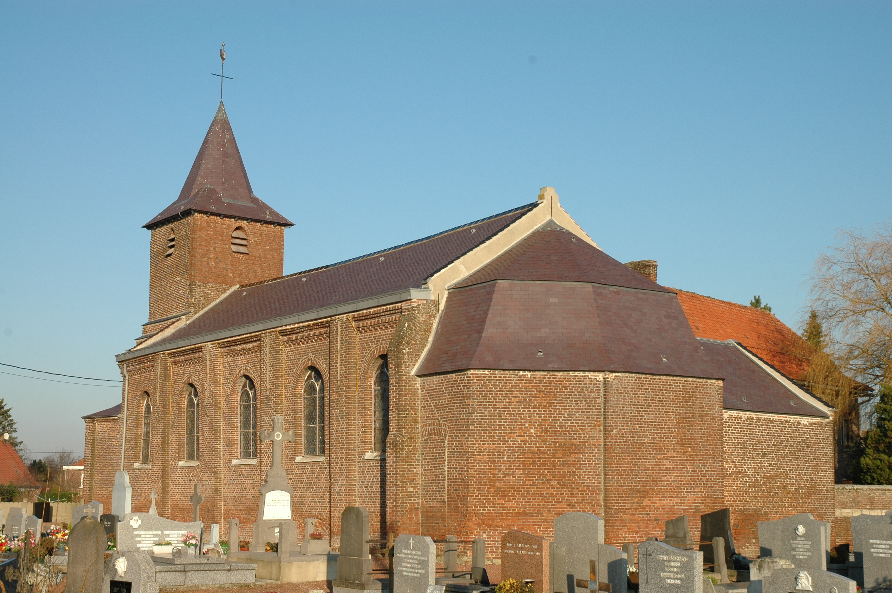 Eglise Saint Quentin d'Herrin